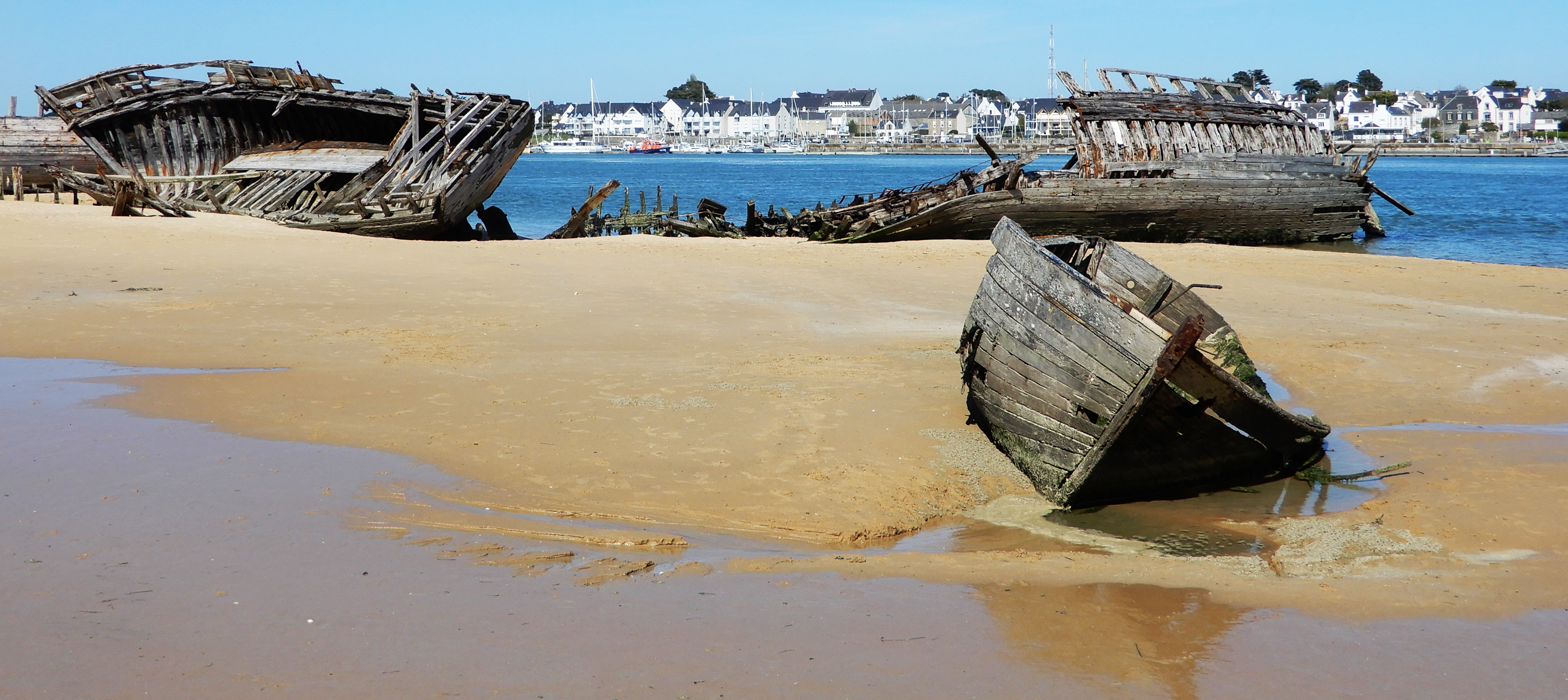 Plouhinec - Le Magouër